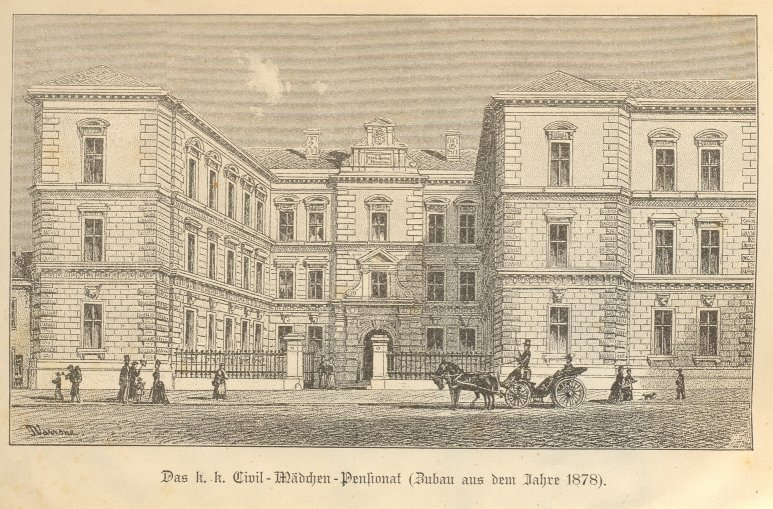 Das k.k. Civil-Mädchen-Pensionat in Wien VIII, Josefstädterstraße 39 (Palais Strozzi)(Zubau aus dem Jahre 1878)